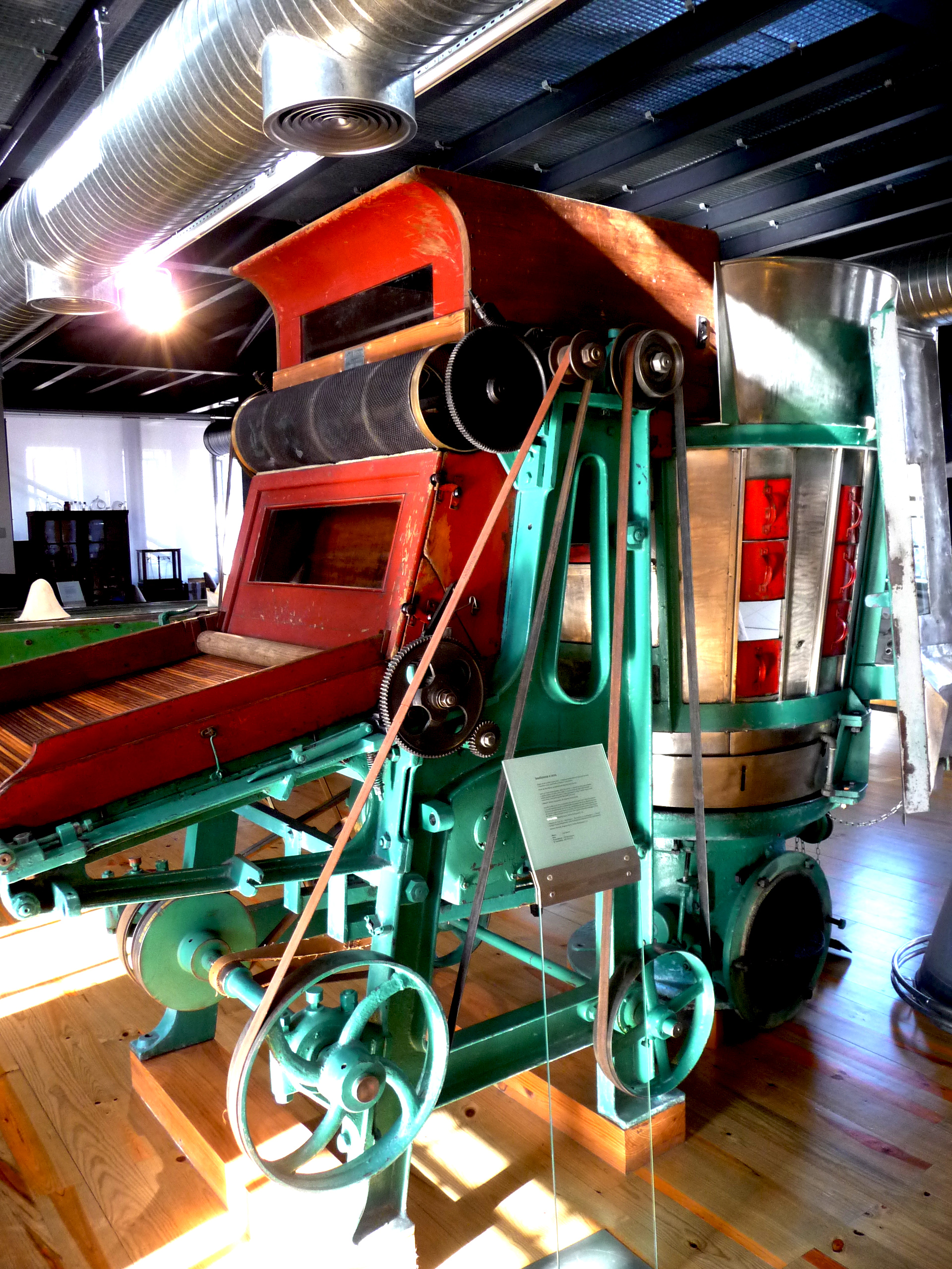 Uma das inúmeras máquinas industriais que se encontram no Museu da Chapelaria.